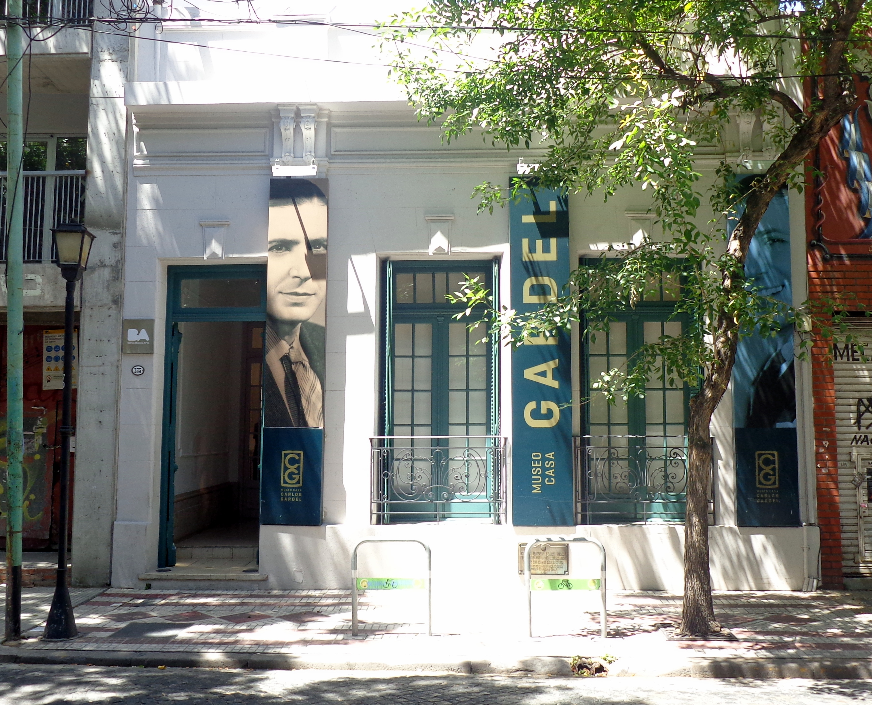 Museo residencia de Carlos Gardel y de su madre, en el barrio de Balvanera, Buenos Aires, Argentina